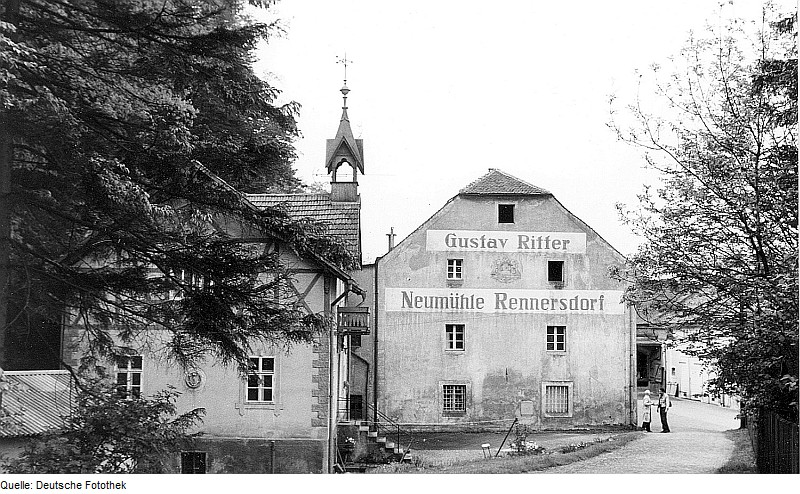 Original image description from the Deutsche Fotothek Berthelsdorf-Rennersdorf. Neu- oder Rittermühle